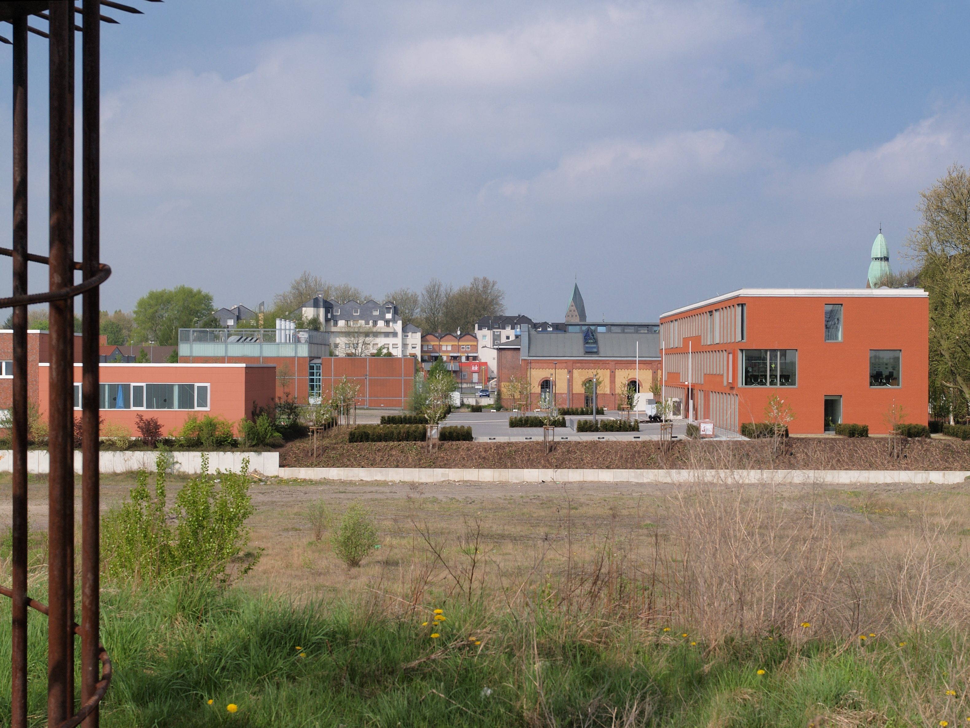 Gewerbegebiet Lothringen auf dem Gelände der ehemaligen Zeche Lothringen 1/2/6 in Bochum-Gerthe, von der Deponie aus gesehen